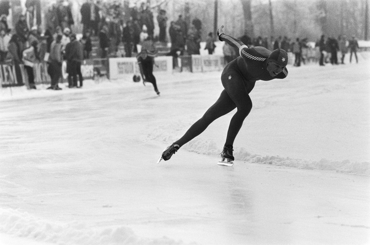 Schaatsinterland Nederland tegen Noorwegen in Groningen. Tom Erik Oxholm (Noorwegen) in actie.